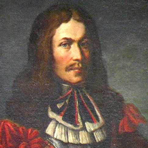 Jobst Josef Moscon ali Jošt Jožef (?-1673)